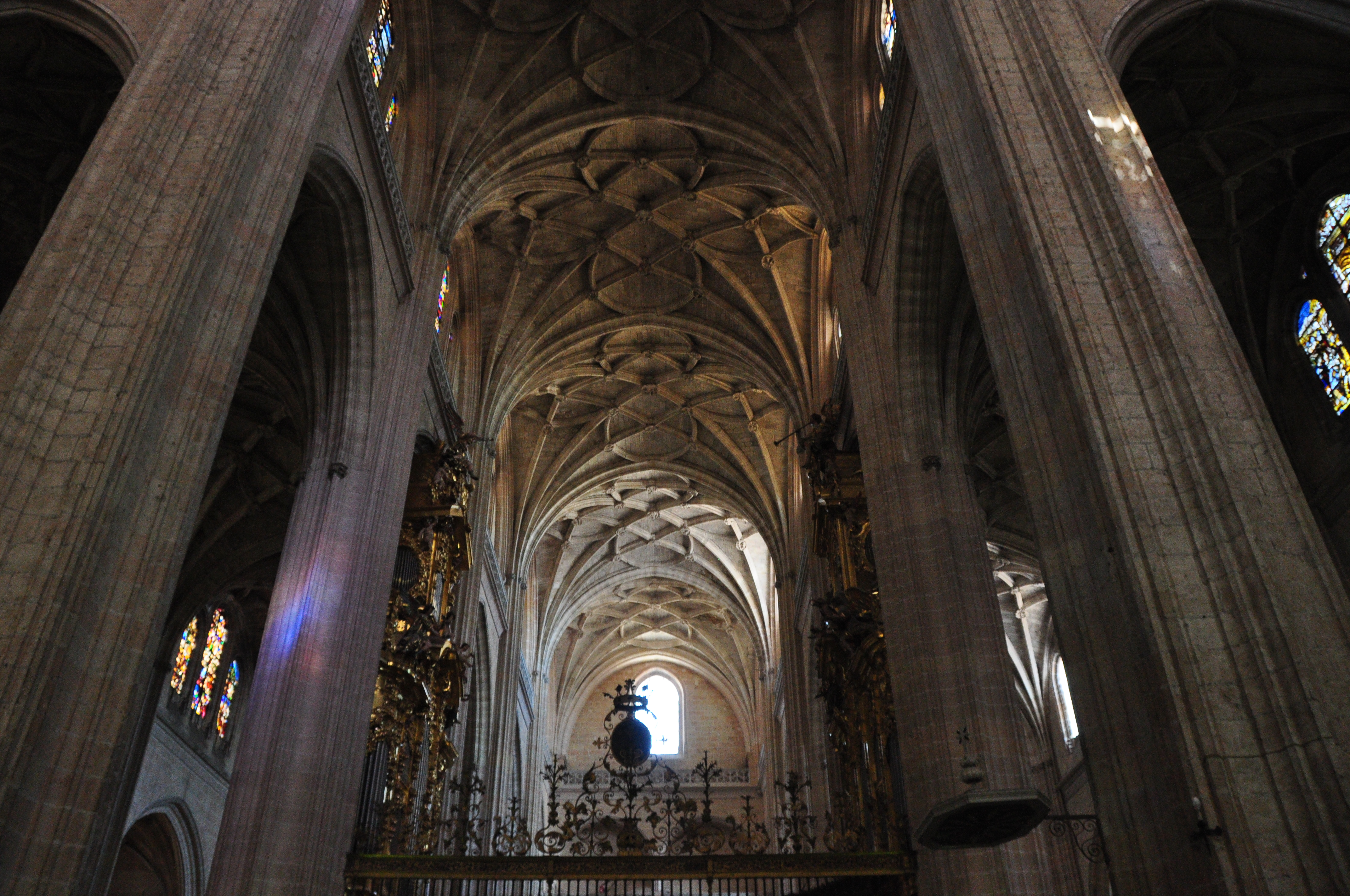 Nave central de la Catedral de Segovia.